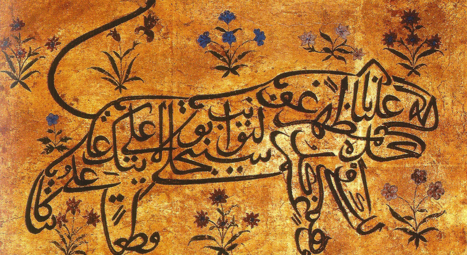 "Allahın Arslanı" olarak anılan Ali'ye atfedilen aslan biçiminde yazılmış naat duası kaligrafisi.